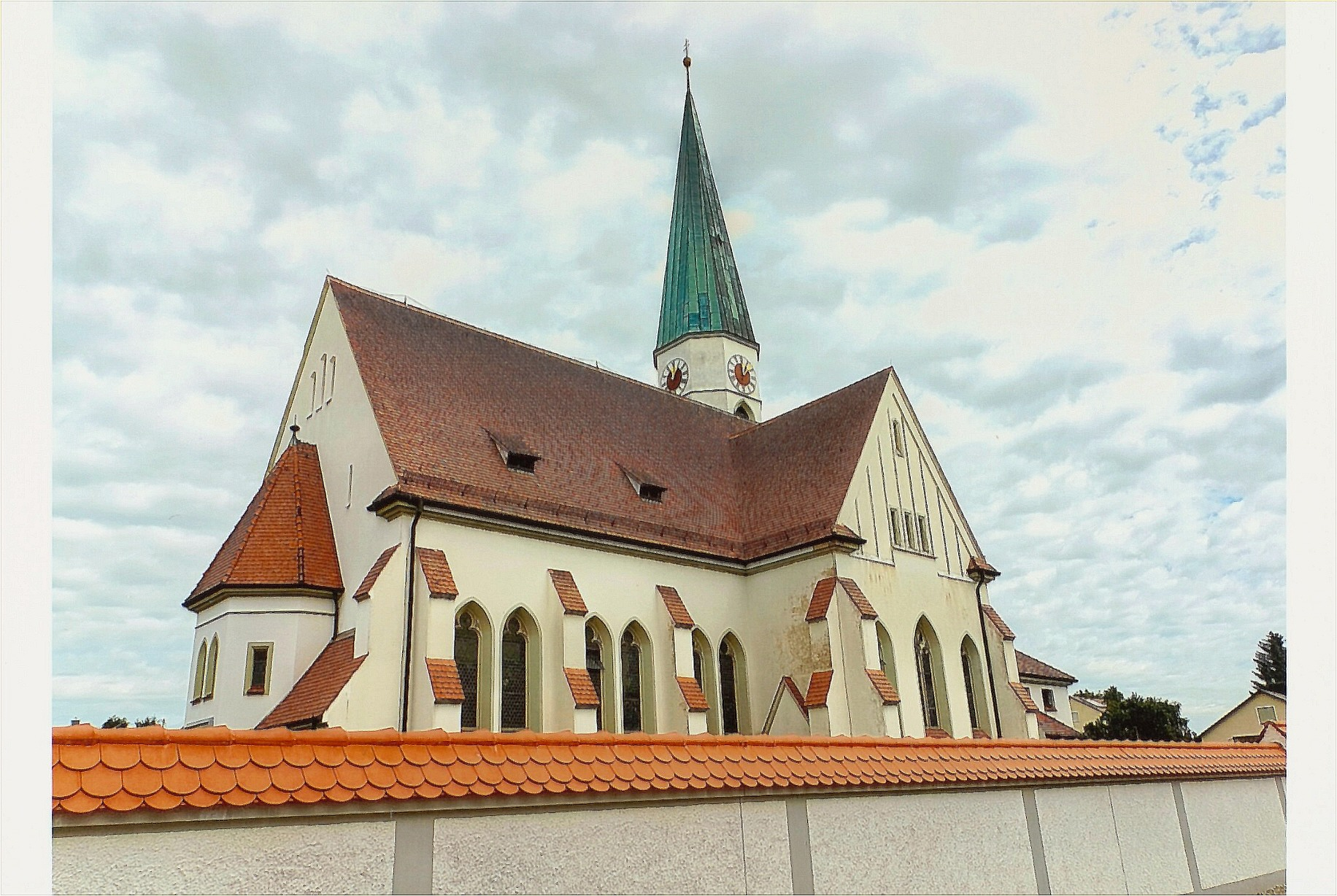 Gundelsdorf (Pöttmes), Pfarrkirche Hl. Kreuz, neugotischer Bau mit Ausstattung.